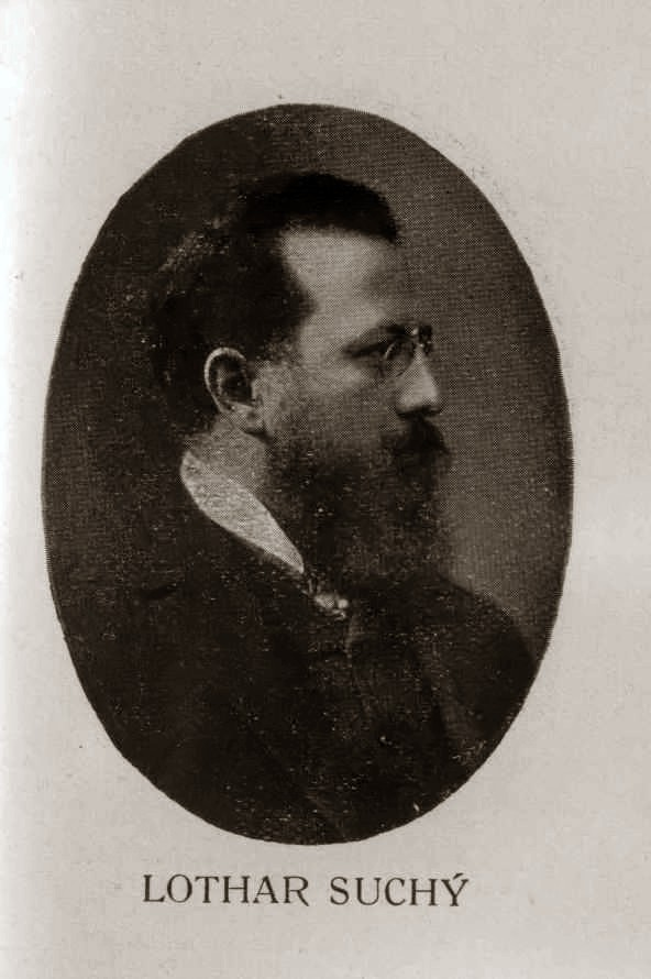 Lothar Suchý (1873 - 1959), Český spisovatel, dramatik, básník a novinář.